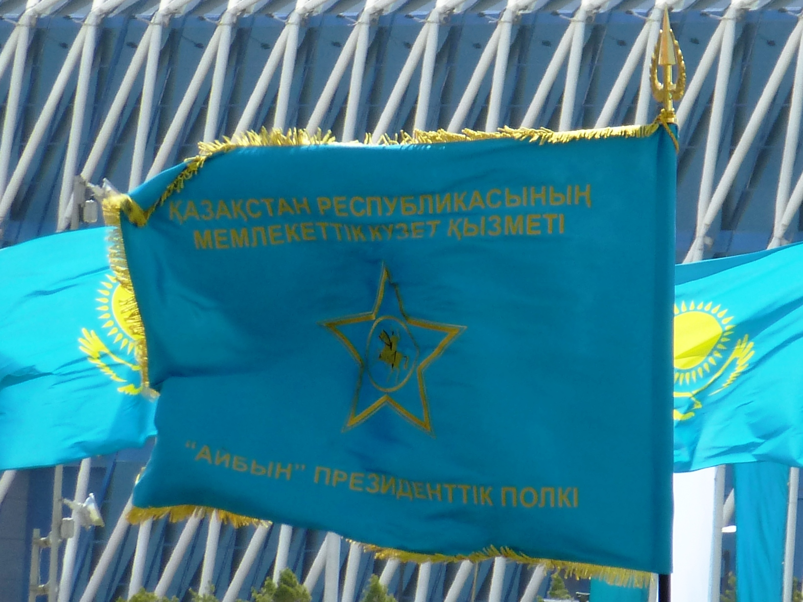 Боевое знамя полка "Айбын" Службы государственной охраны Республики Казахстан. Нур-Султан. 7 мая 2017 года.